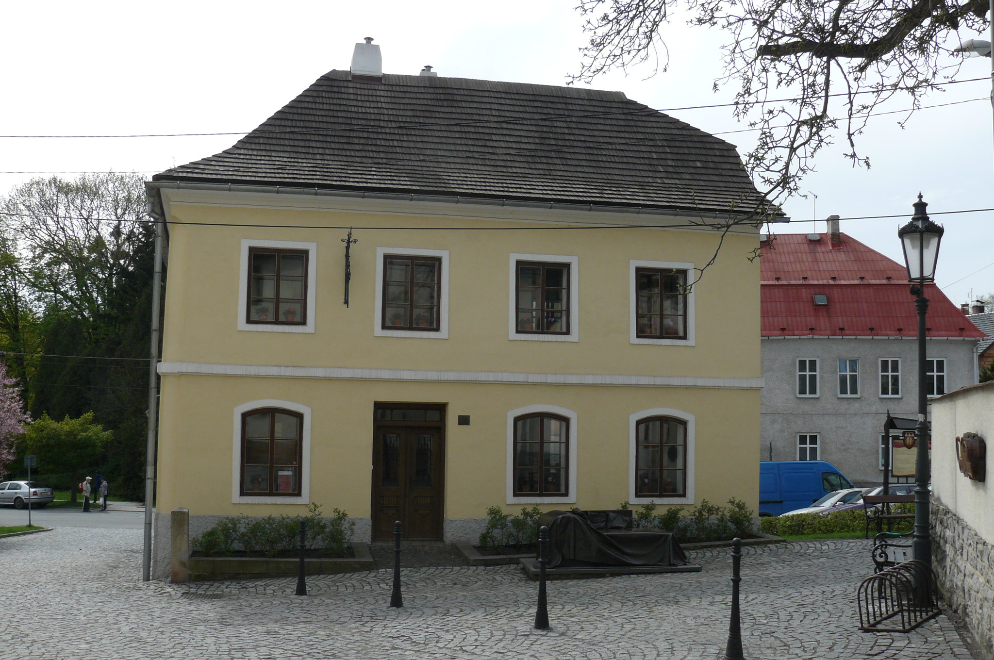 Dom urodzin Zygmunta Freuda w Priborze.